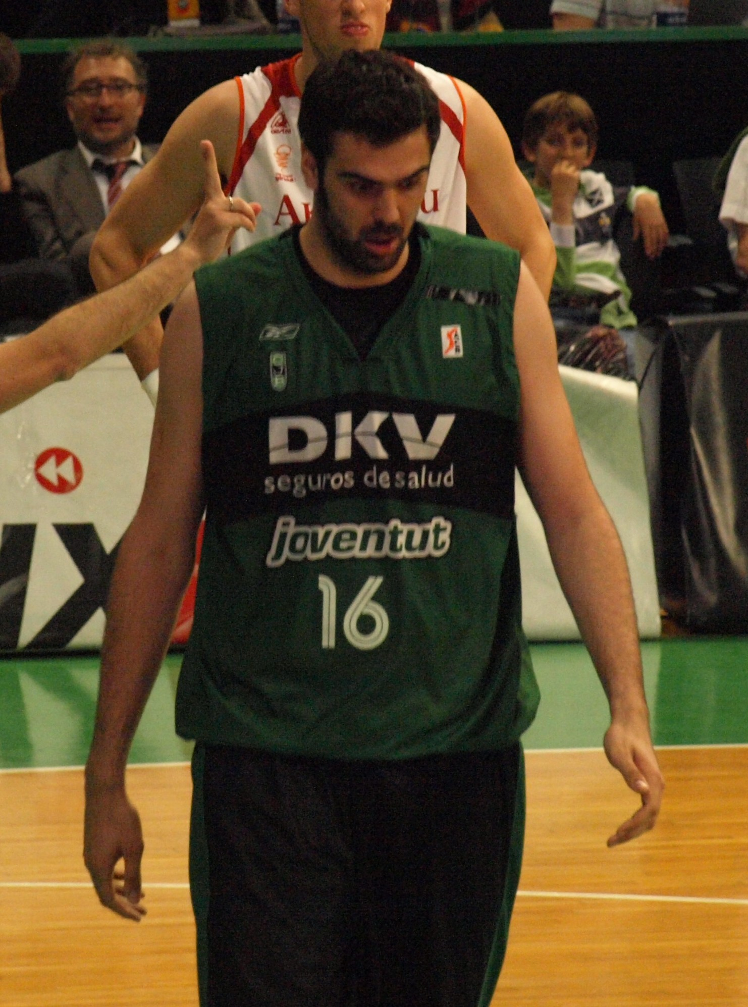 Edu Hernández Sonseca con la camiseta del Jouventut en un partido correspondiente a los play-offs de la liga ACB 07-08 en el Olímpico de Badalona